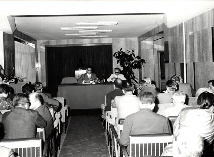 Brionski plenum 1. jula 1966